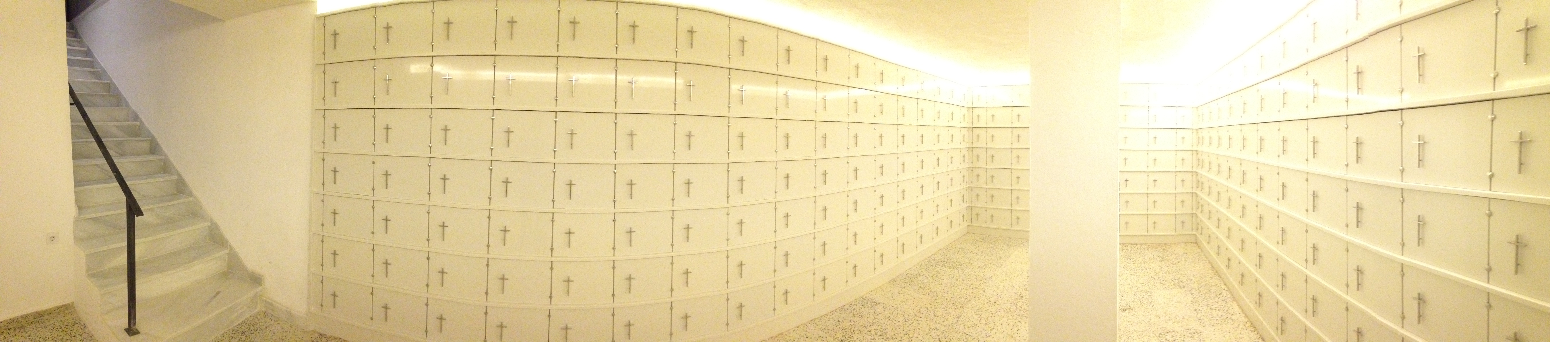 Cripta-Columbario de la Iglesia de San Dionisio Areopagita